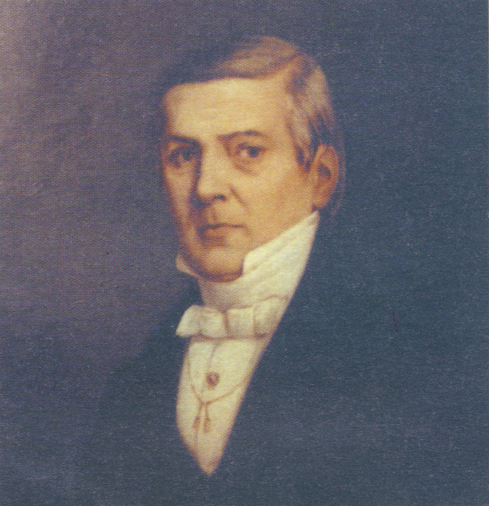 Retrato de José Longinos Ellauri (1789 - 1867),(, integrante de la primera Asamblea Constituyente del Uruguay.